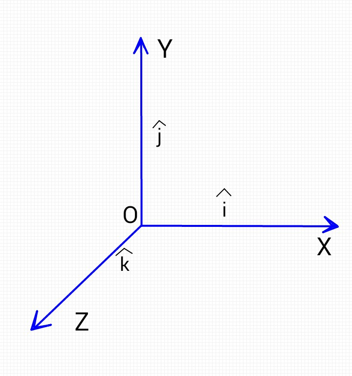 ত্রিমাত্রিক কার্টেসীয় স্থানাঙ্ক ব্যবস্থার তিনটি ধনাত্মক অক্ষ বরাবর এই একক ভেক্টরসমূহ ক্রিয়া করে।